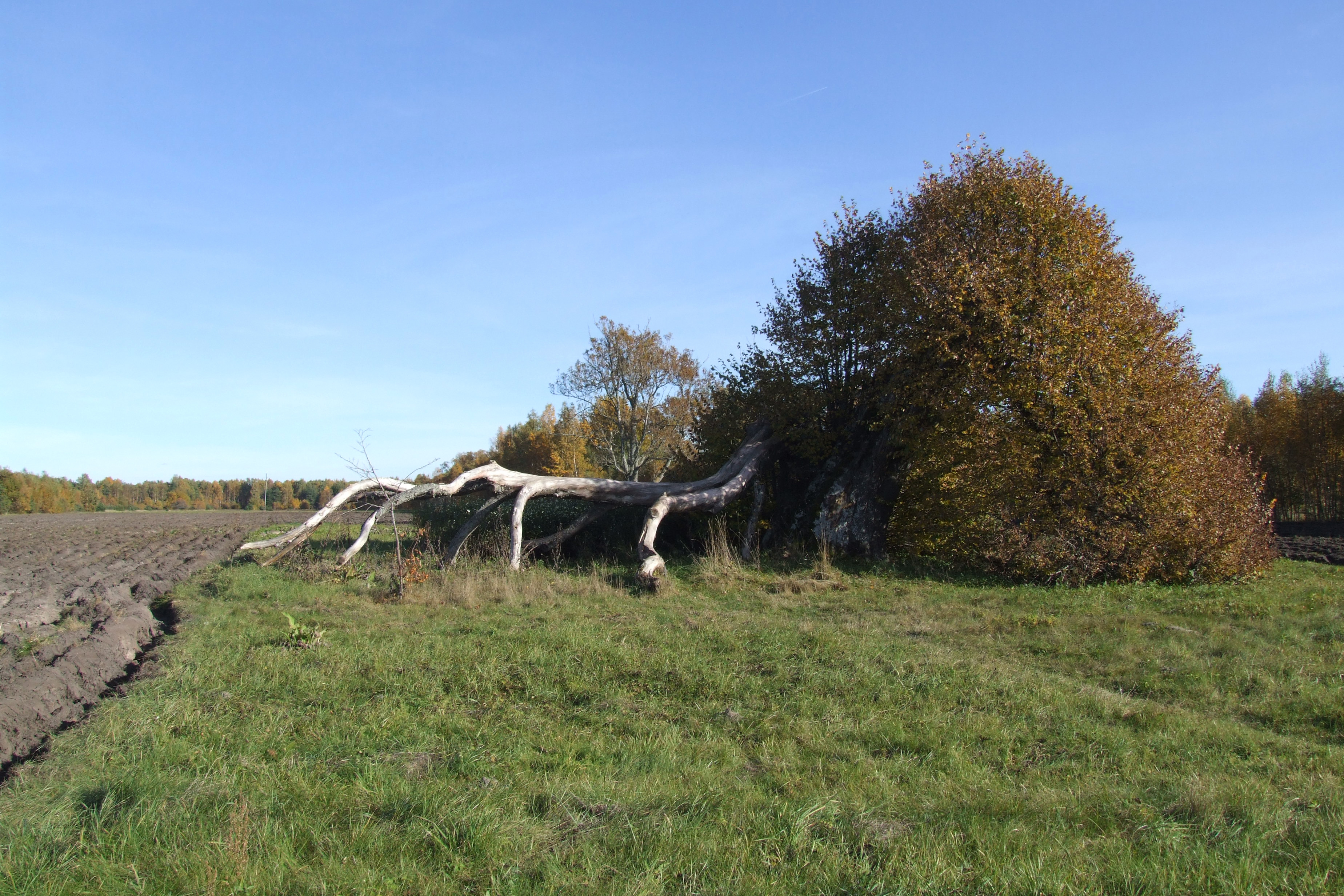 Aužuļu dižliepa, 12.10.2013.